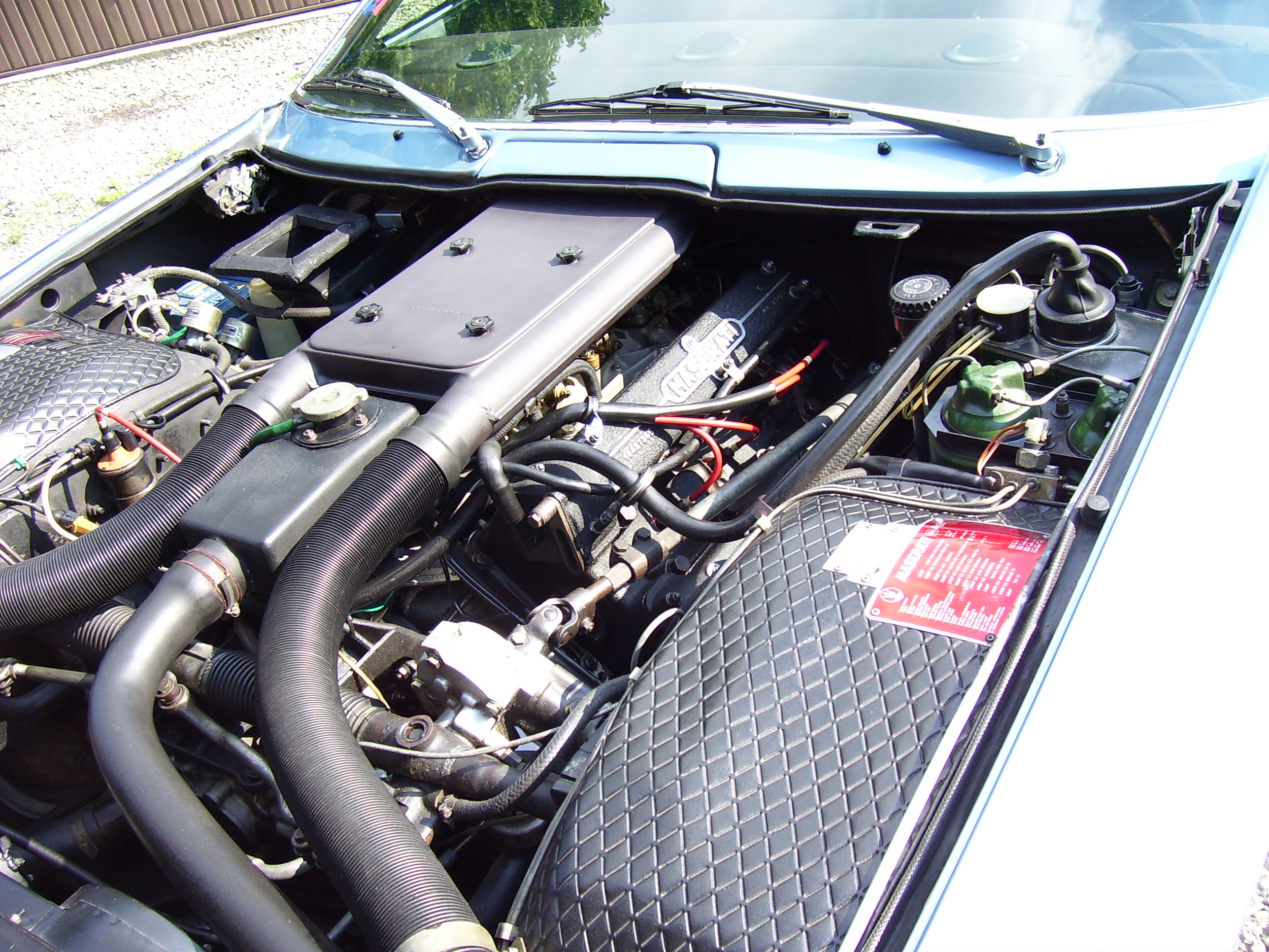 MASERATI KHAMSIN AM 120